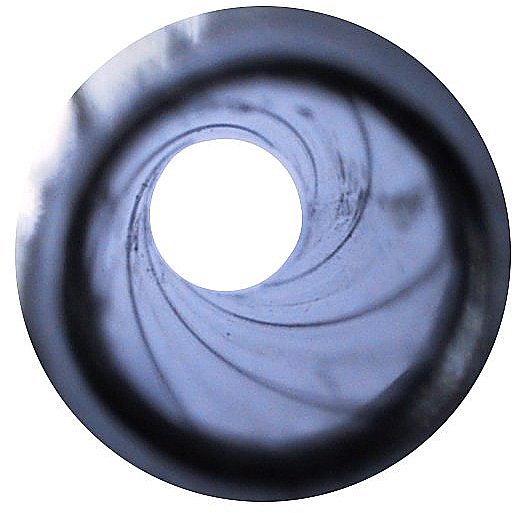 Züge einer 9mm Pistole (selbst aufgenommen, FDL) (Original text: Züge eine 9 mm Pistole vom Patronenlager aus gesehen) Weitere Nutzung: WaffenWiki